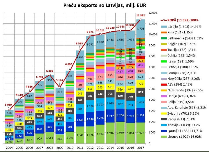 Preču eksports, dinamika pa valstīm